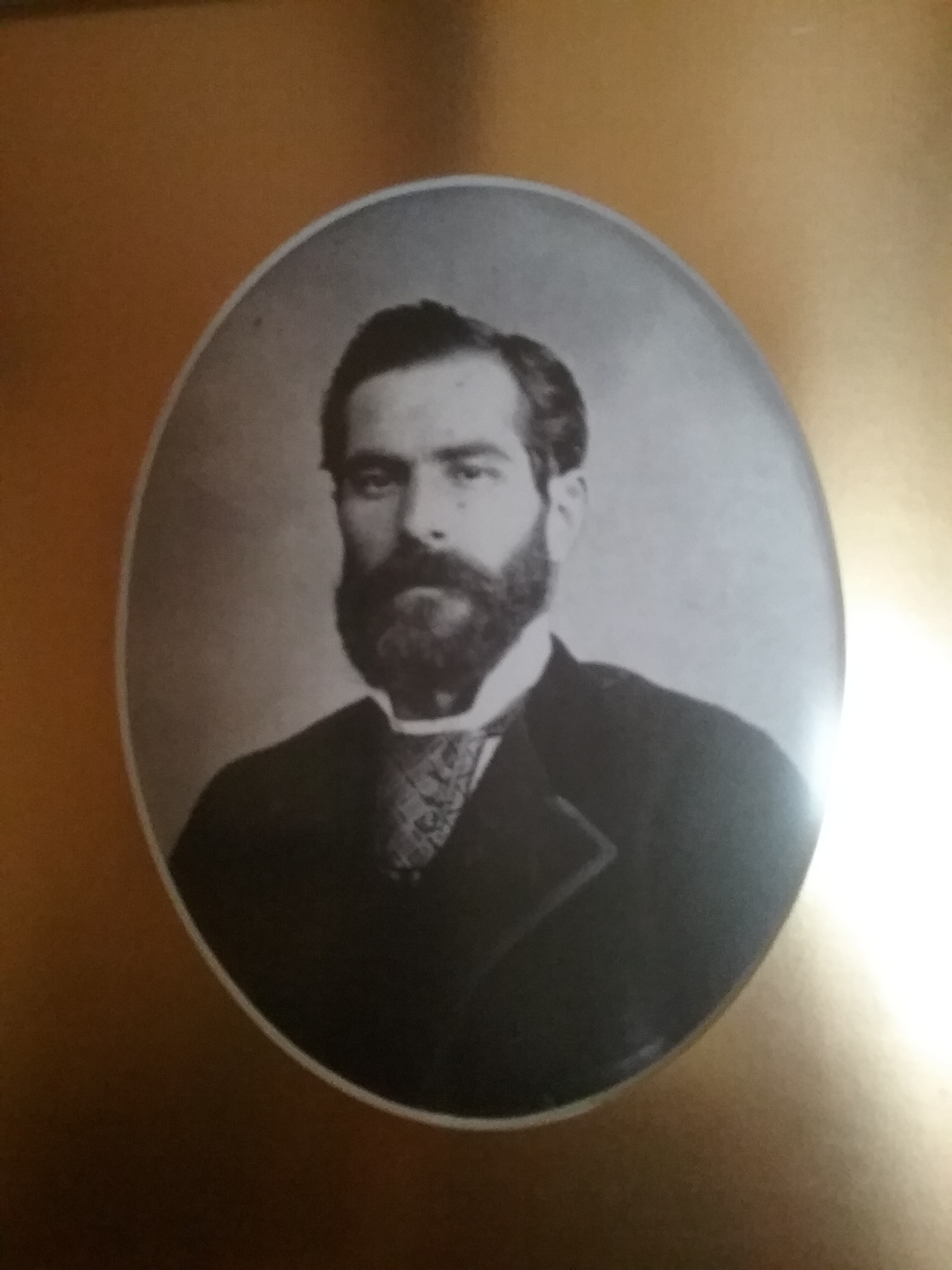 Retratado por J.M. Cordeiro hacia 1873-1874. Colección particular.